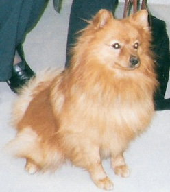 Mittelspitz, Medium-sized German Spitz, German Mittelspitz, German Spitz Medium